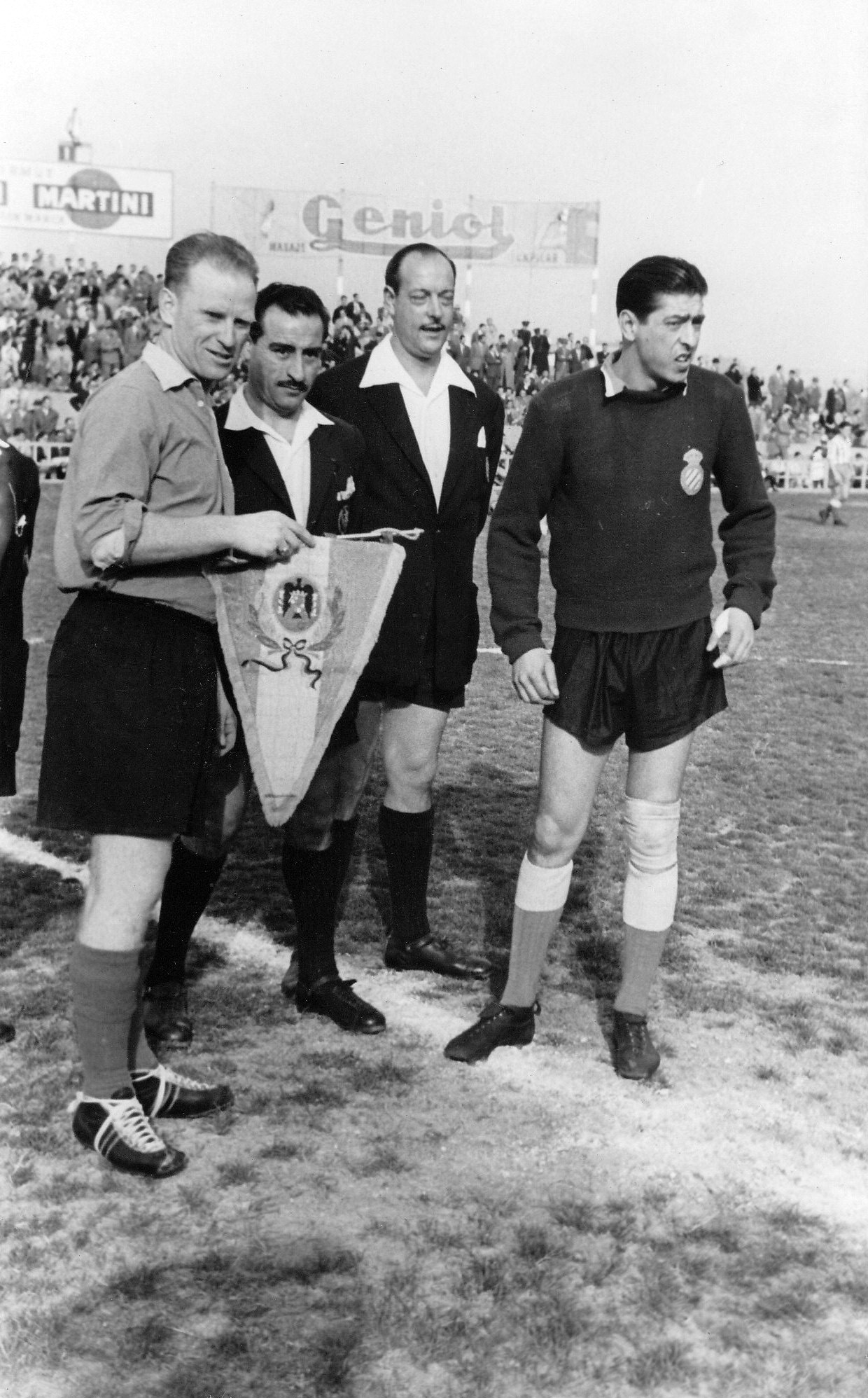 Johann Herberger als Spielführer der Stuttgarter Kickers vor dem Freundschaftsspiel gegen Espanyol Barcelona im Rahmen des 50-jährigen Jubiläums des spanischen Vereins an Ostern 1953.